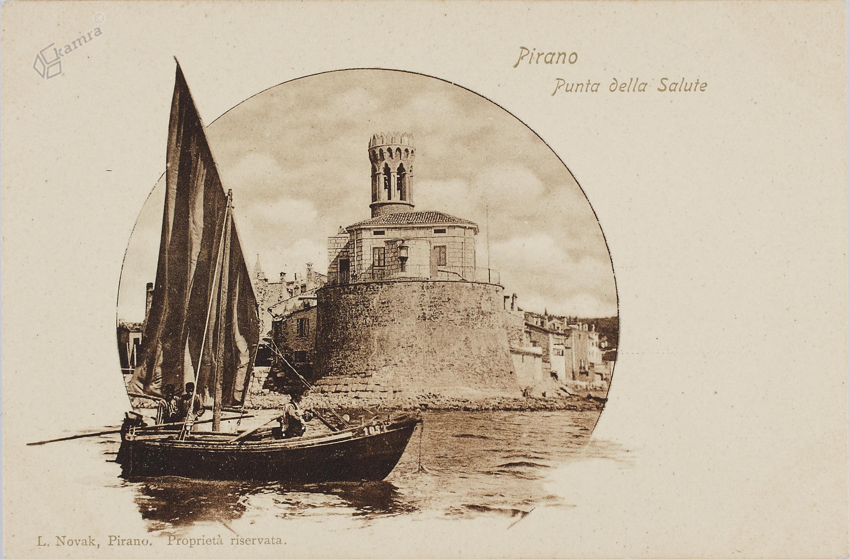 Razglednica Pirana.